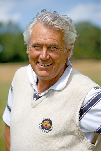 Jesper Aspegren